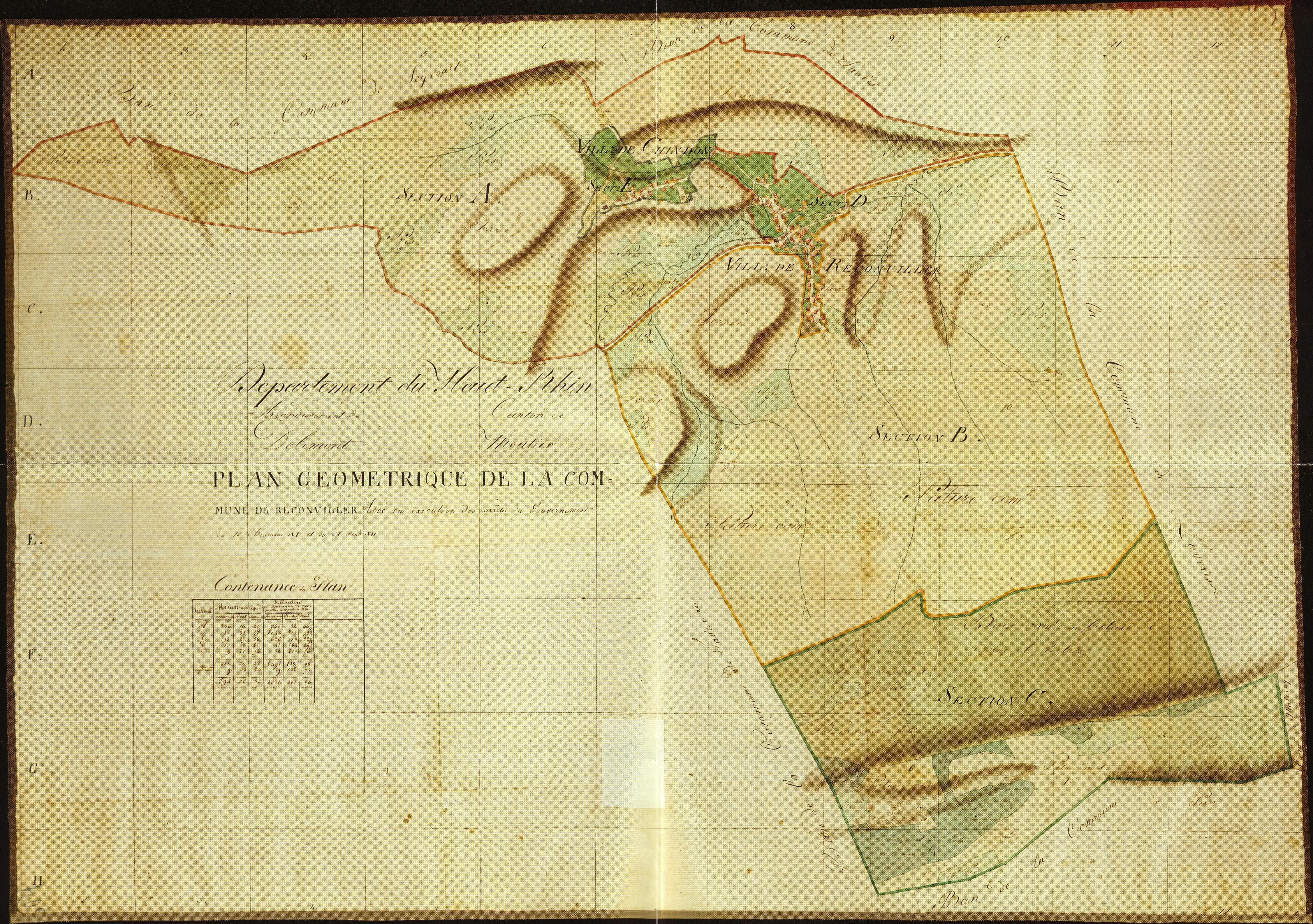 Plan géométrique de Reconviller sous l'occupation française (Département du Haut-Rhin) établi entre 1800 et 1815. Le plan mentionne « levé en exécution des arrêtés du Gouvernement du 12 Brumaire XI (3 novembre 1799) et du 27 Vend XII (18 octobre 1800)».